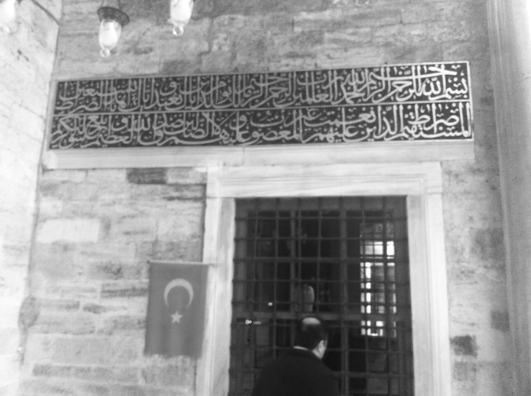 Beşir Ağa Türbesi - Eyüp